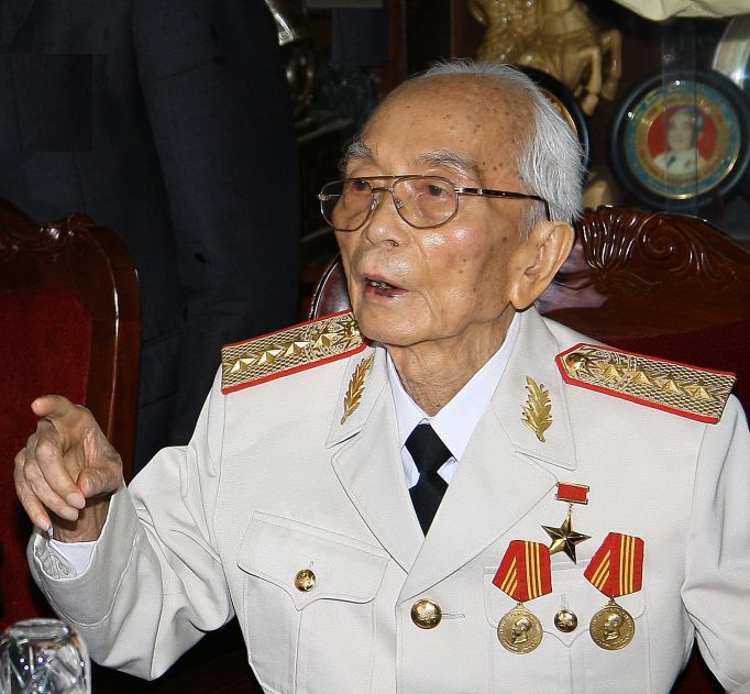 O líder político e general vietnamita Vo Nguyen Giap